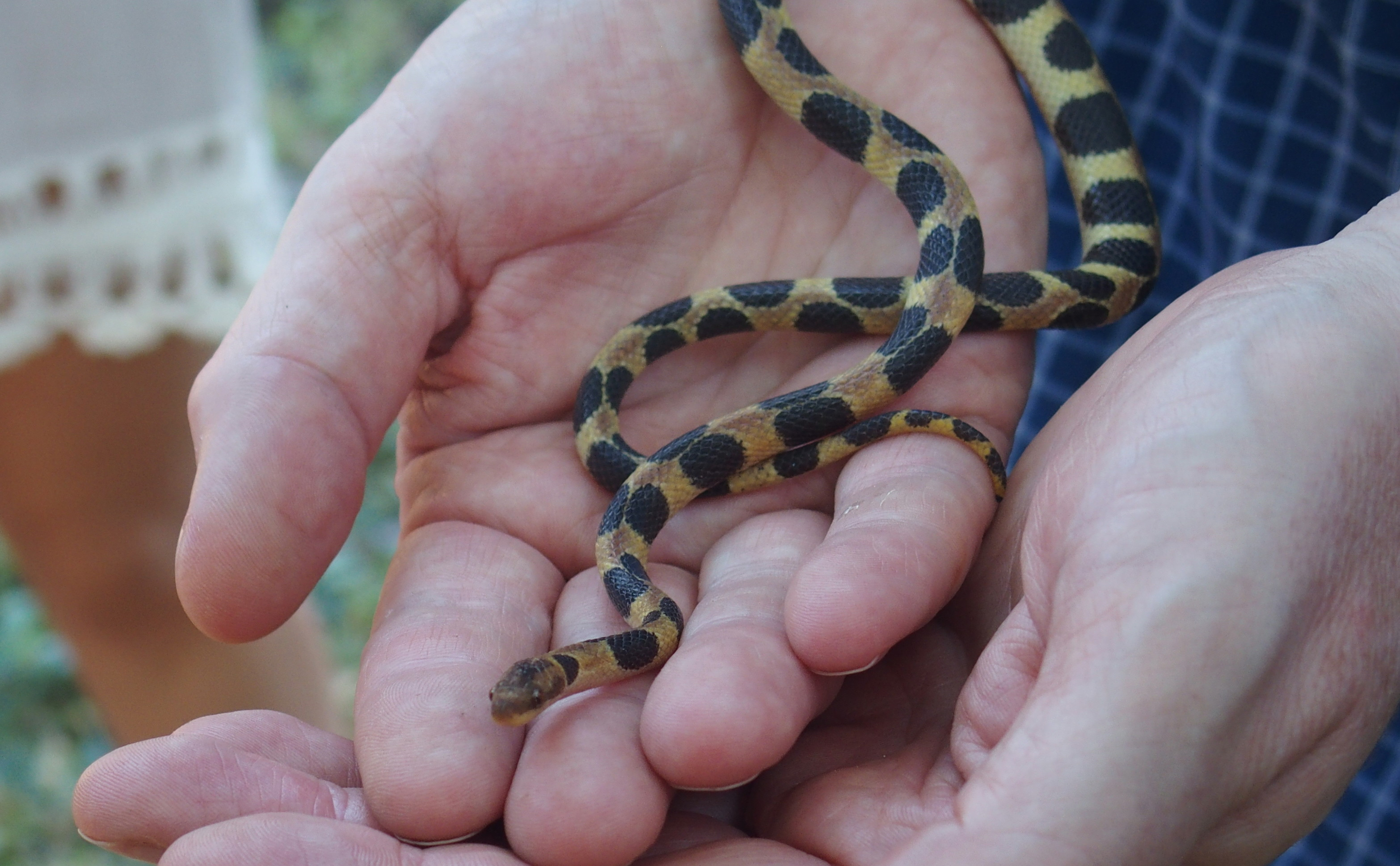 Schlange auf Kuba